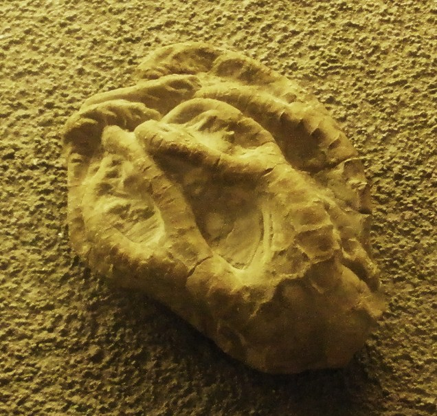 Fossil of Onychocrinus, an extinct echinoderm - Took the photo at Naturalis museum, Leiden